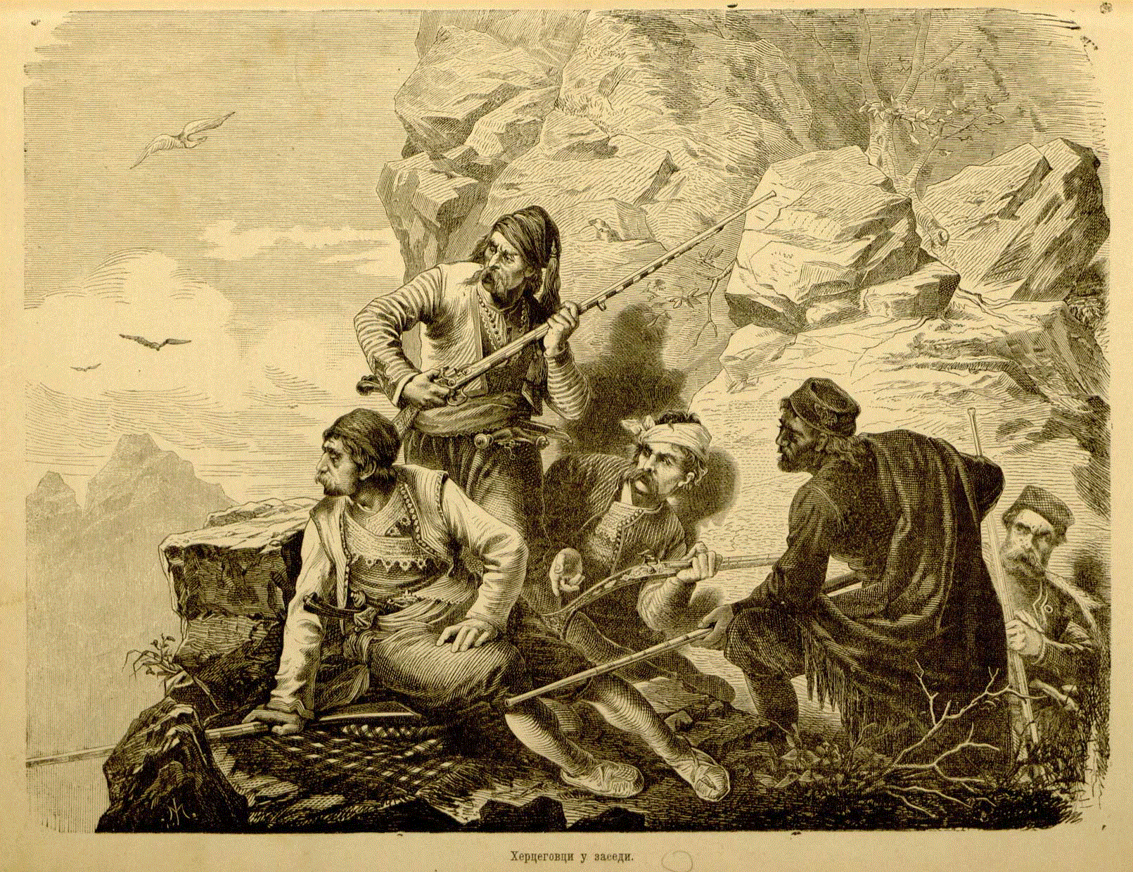 Герцеговинцы в засаде. Картина про восстание в Боснии 1875 года. Иллюстрация из газеты „Српске зоре“.